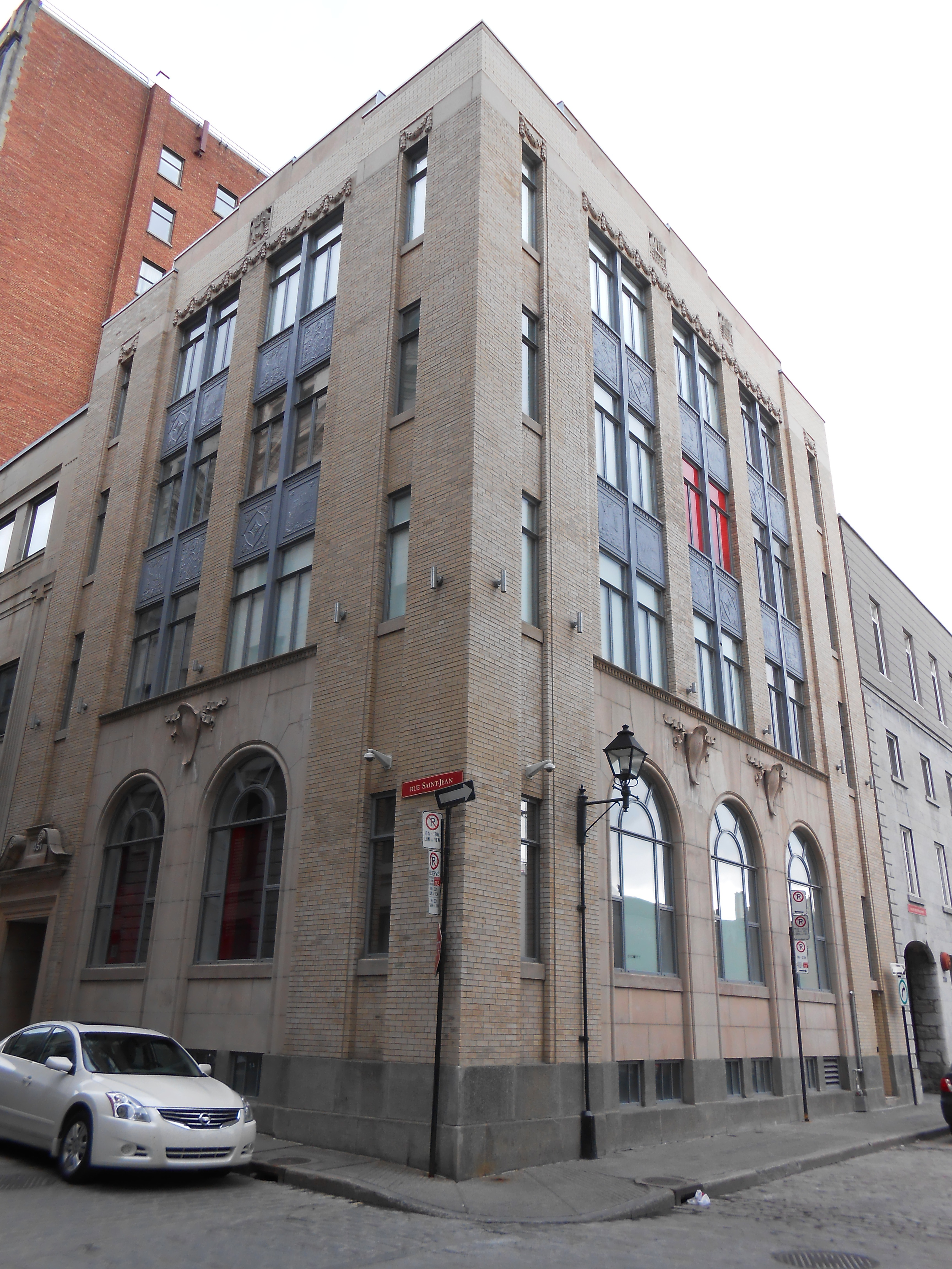 Immeuble Robert Hampson & Son, 451, rue Saint-Jean / rue du Saint-Sacrement (façade latérale sans numéro civique) / Montréal